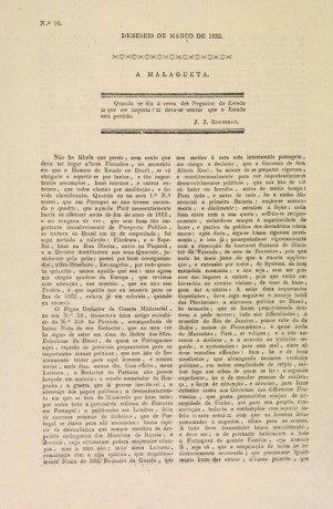 A Malagueta, De Luiz Augusto May, vivia entre "tapas e beijos" com o poder, até ser empastelado em 1823 e seu dono, espancado. Malagueta, Rio de Janeiro, 16 de março de 1822.